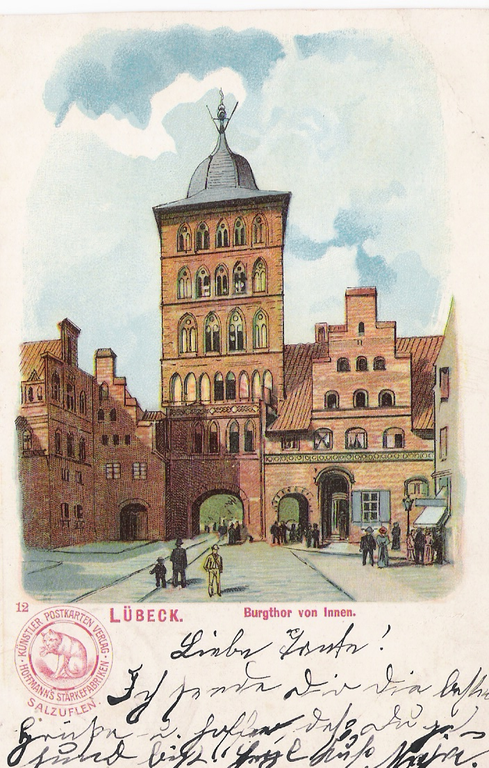 Deutschland, Nordrhein-Westfalen, Kreis Lippe, Bad Salzuflen: Postkarte der ehemaligen Hoffmann’s Stärkefabriken, Lübecker Burgtor (Innenansicht)